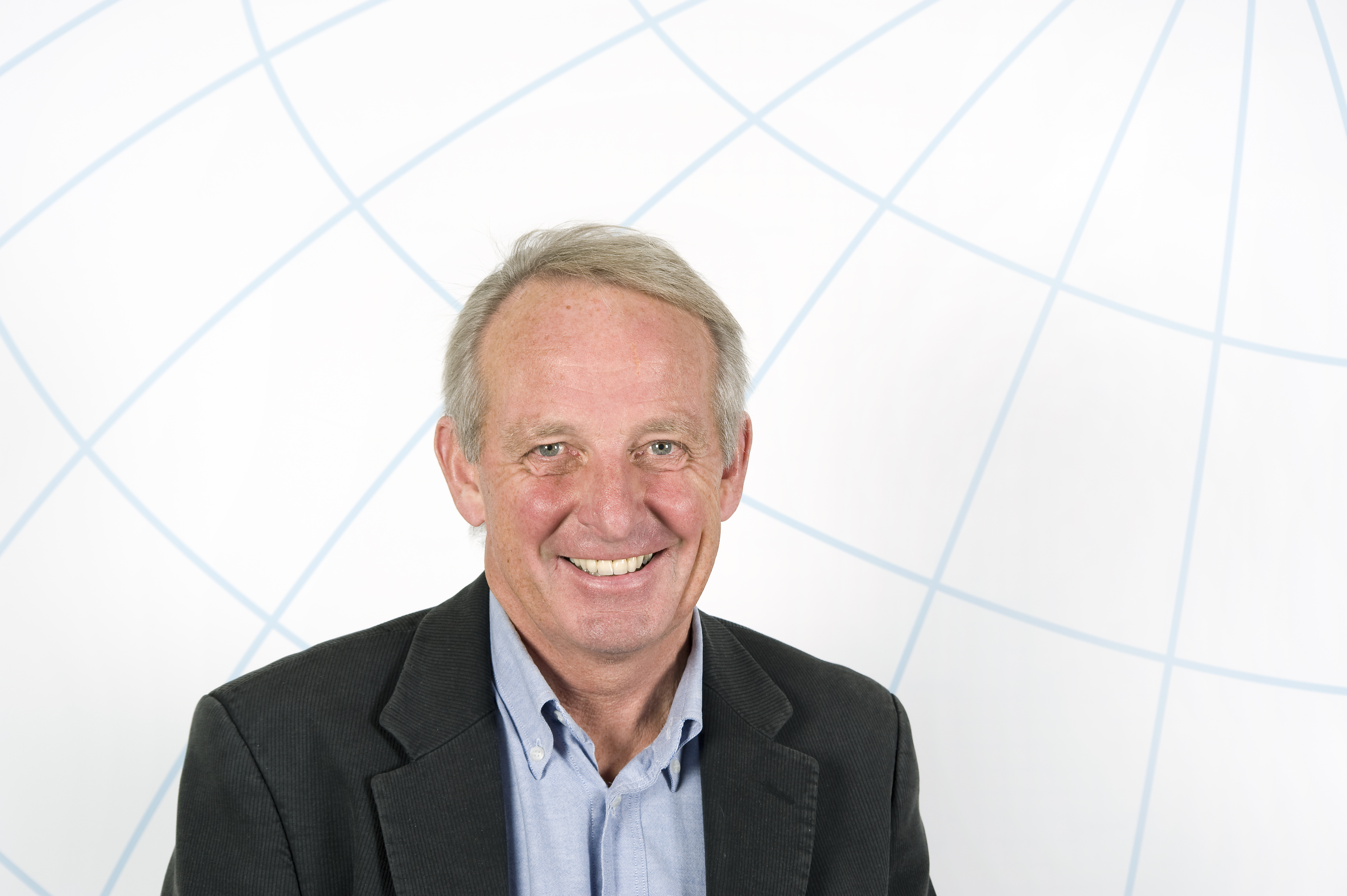 �ge Hadler, informasjonssjef Statens kartverk Head of Communication